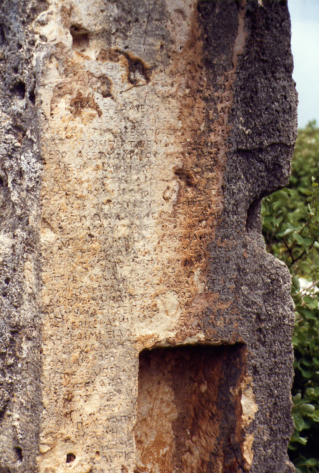 Inschrift in pamphylischer Sprache an einem Gebäude in Sillyon, Südtürkei